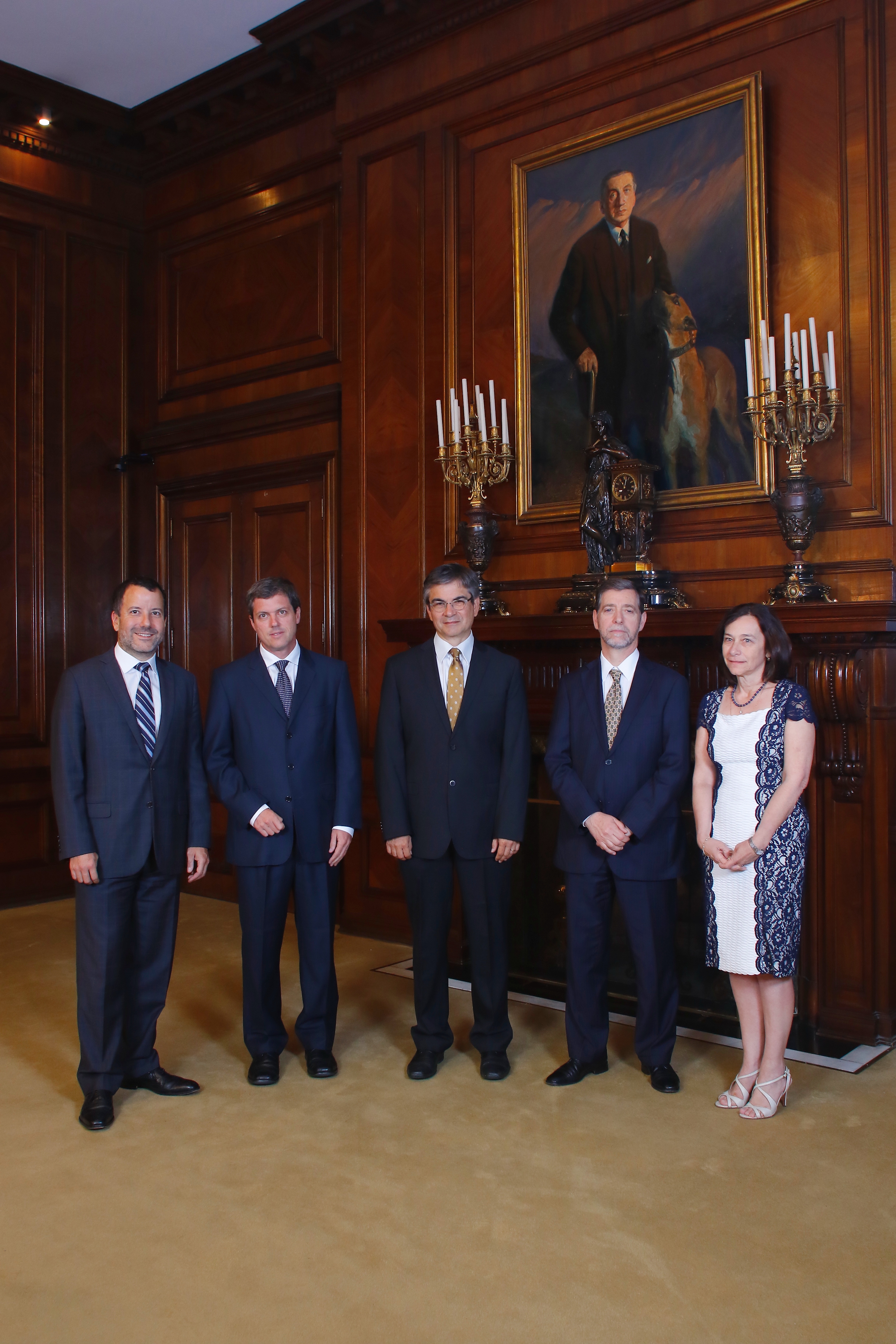 El Consejo del Banco Central de Chile a febrero de 2017